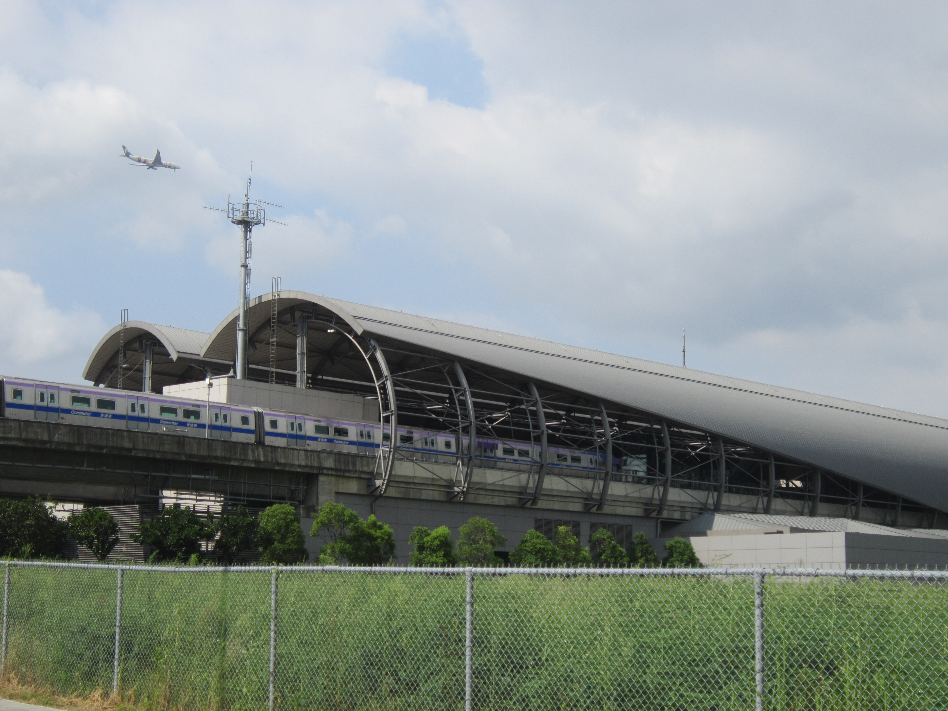 一列列車正駛進新北產業園區站